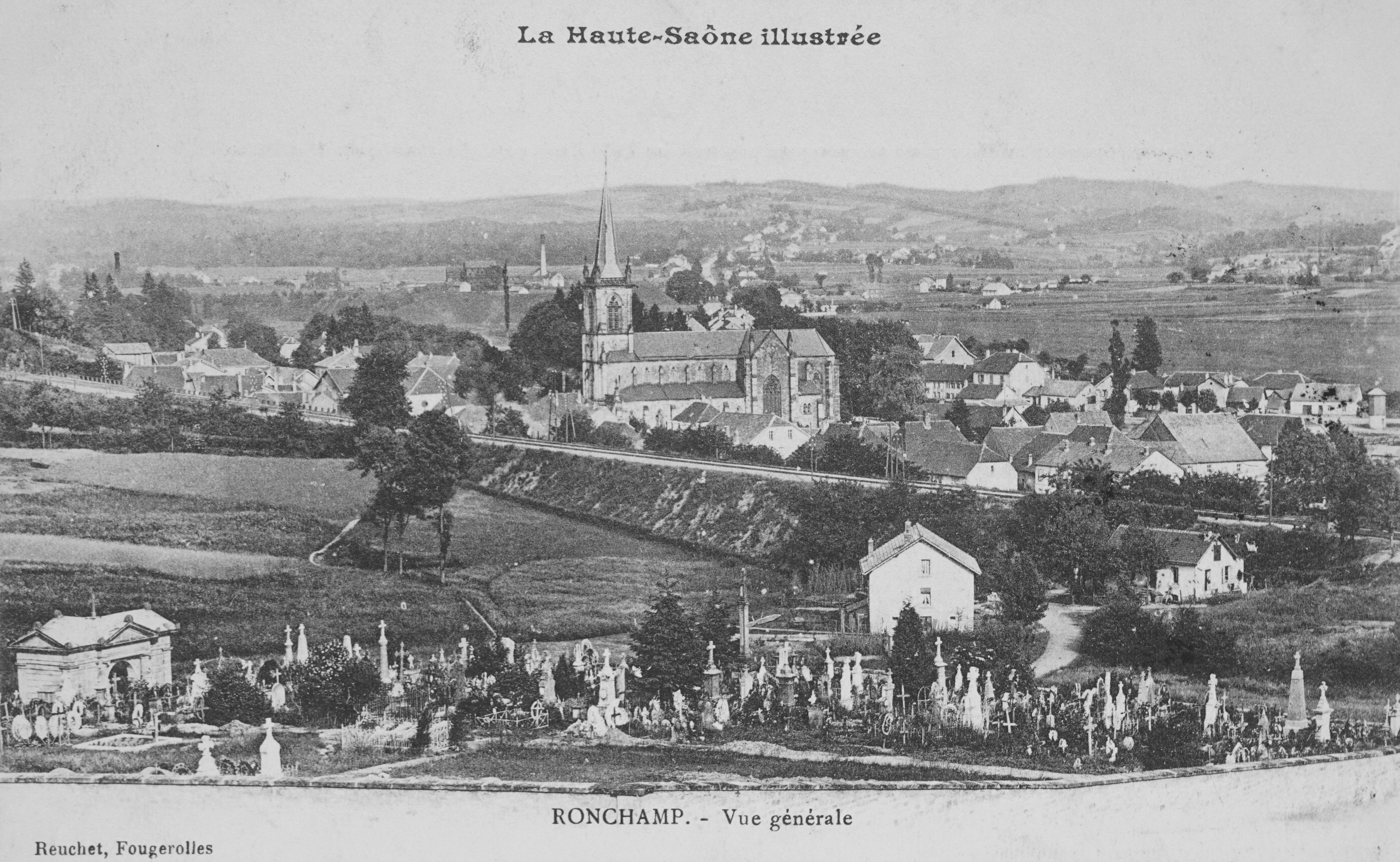 Vue générale de Ronchamp (Haute-Saône) à la fin du XIXème siècle.